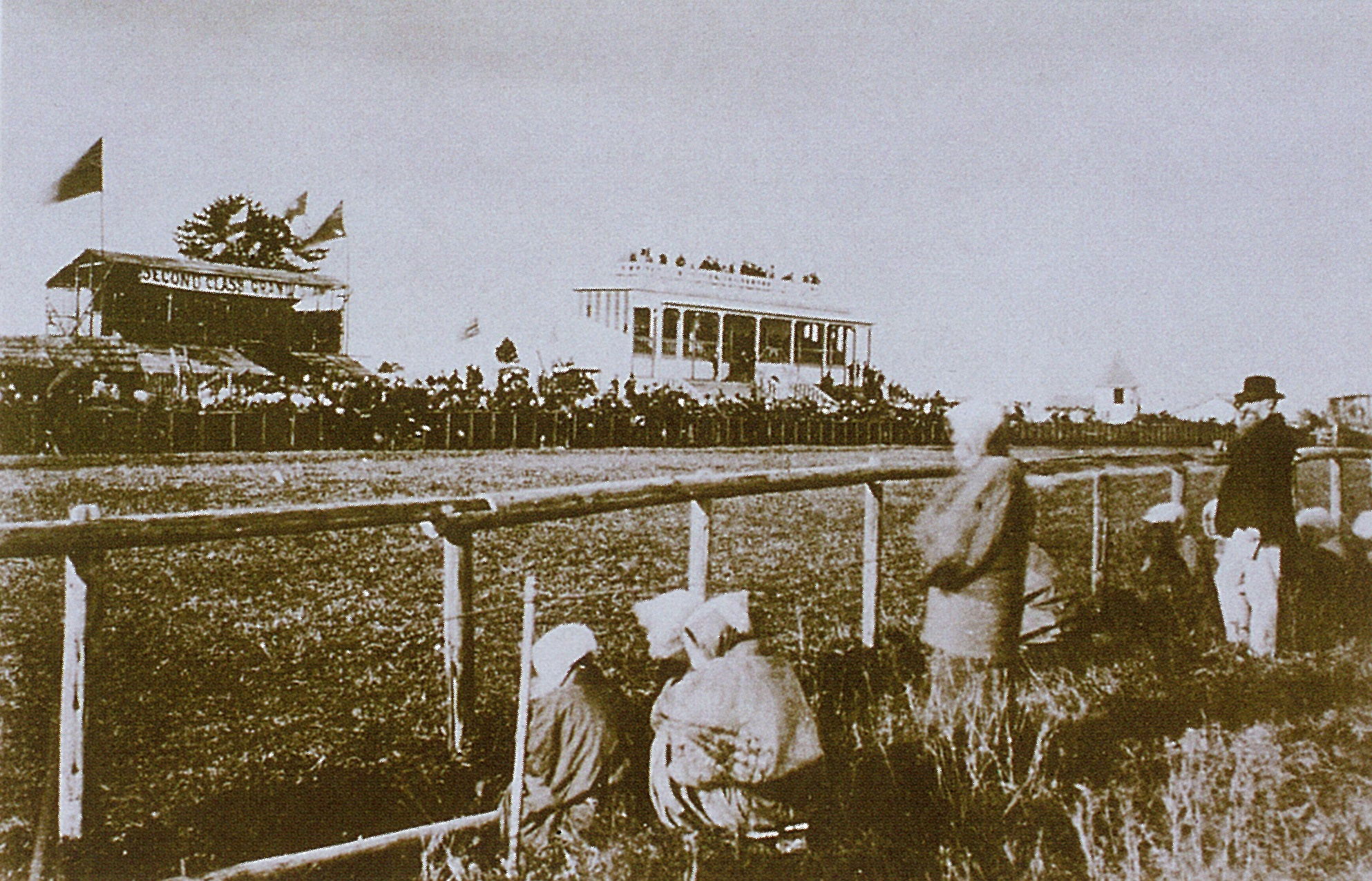 横浜根岸競馬場 秋の競馬開催 メインスタンド前 1870年(明治3年) 頬かむりしているのは日本人、シルクハットは外国人